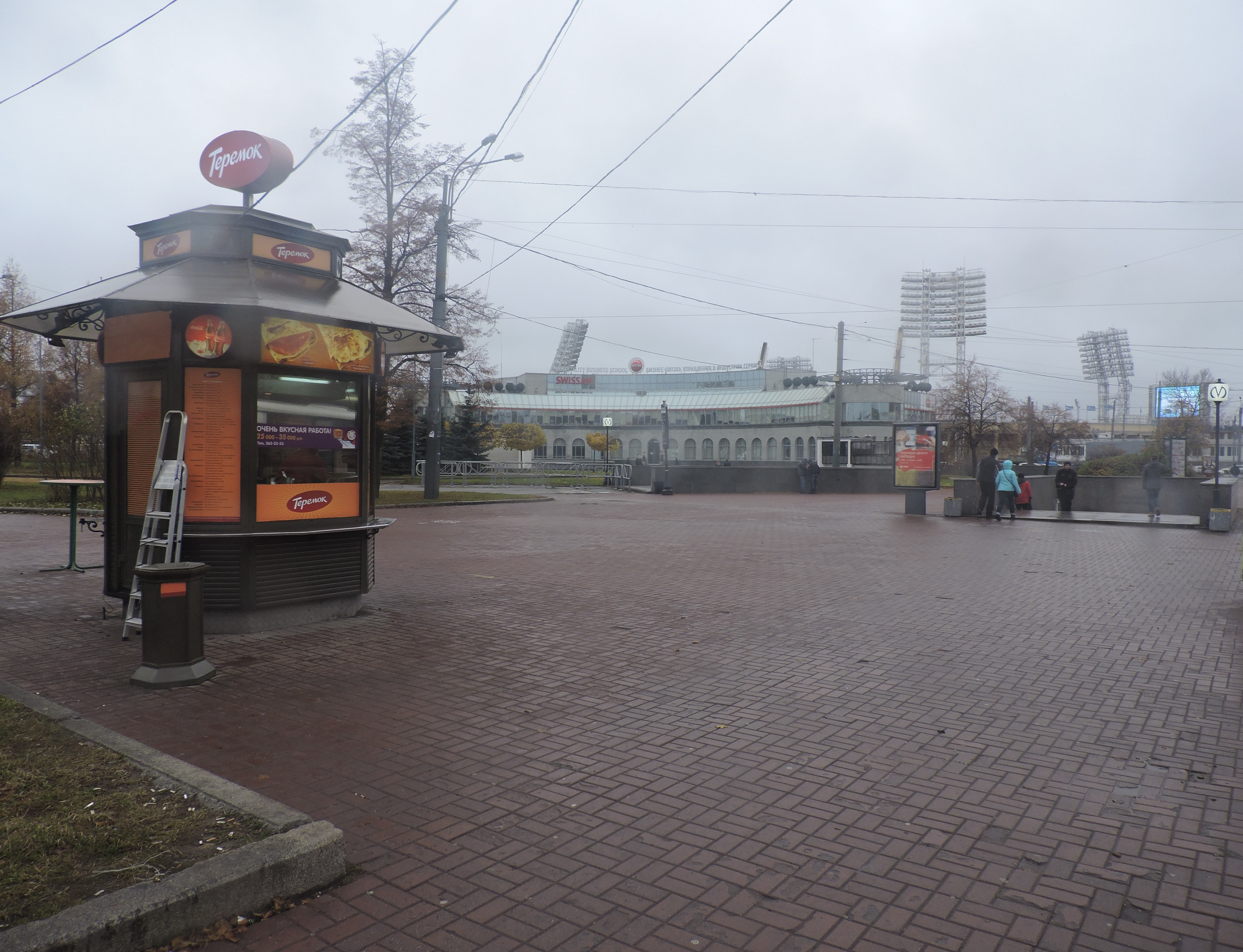 У станции метро "Спортивная"